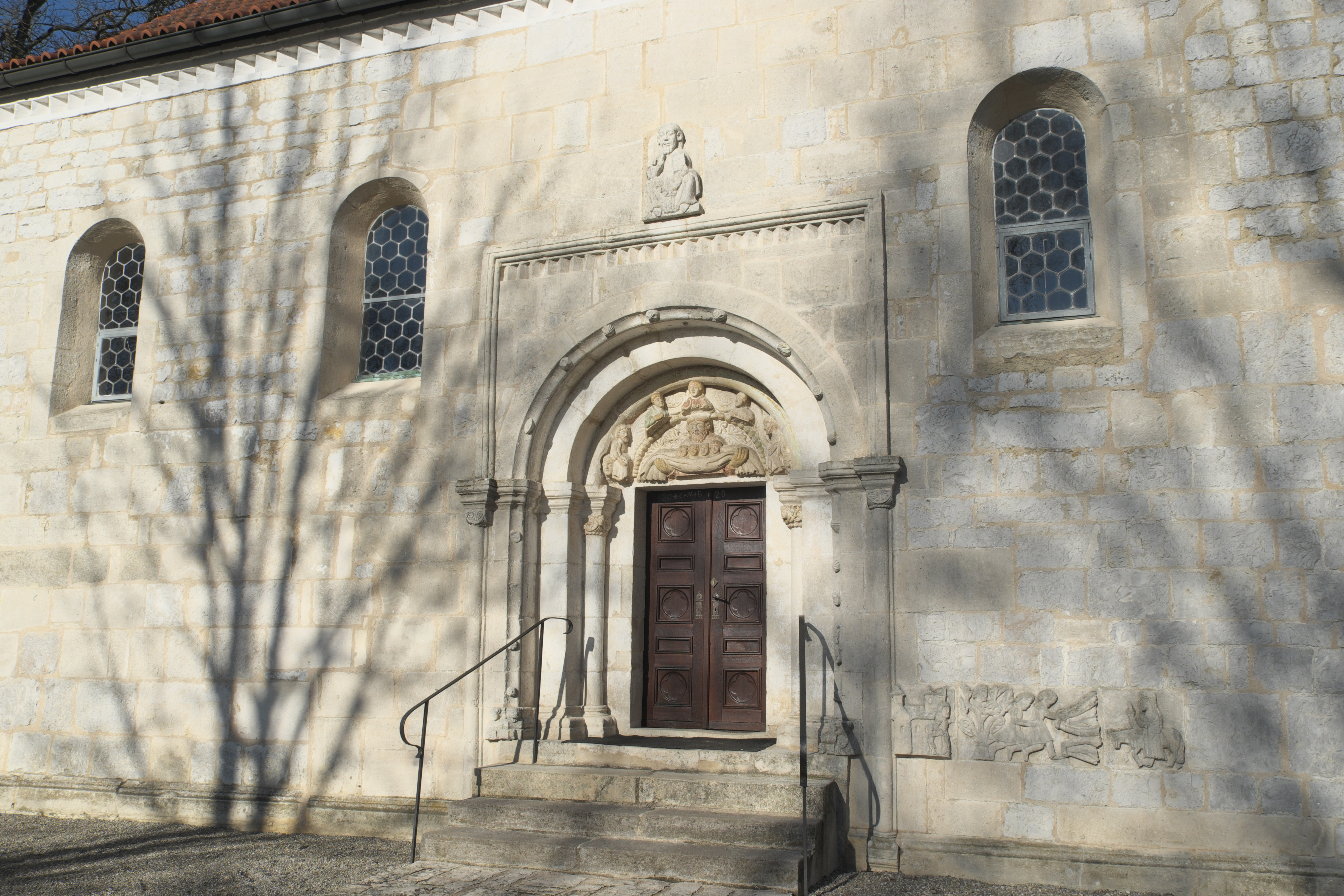 Katholische Pfarrkirche St. Ulrich in Ainau (Geisenfeld) im Landkreis Pfaffenhofen an der Ilm (Bayern/Deutschland), Südfassade und Portal